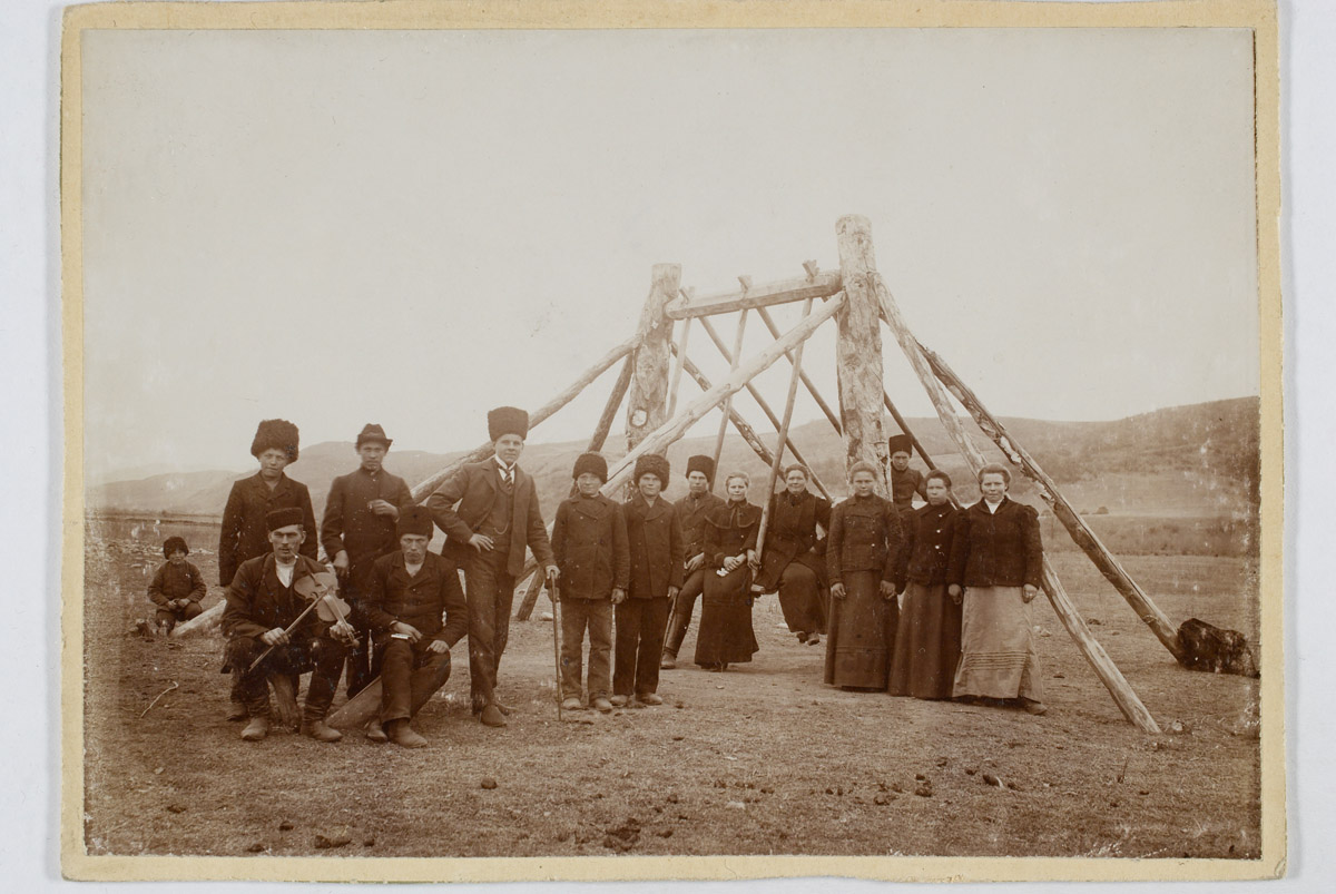 Kiigelised Maruhas (Eesti asundus Põhja Kaukaasias) Kuubanimaal